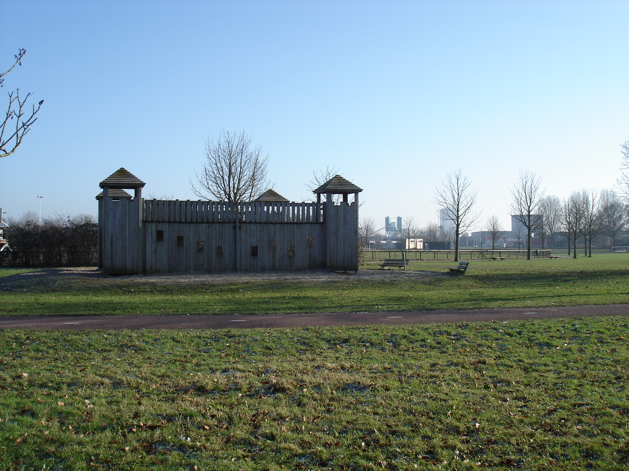 Stinspark in Westenholte te Zwolle met een knipoog naar het verleden toen hier Kasteel Voorst stond.